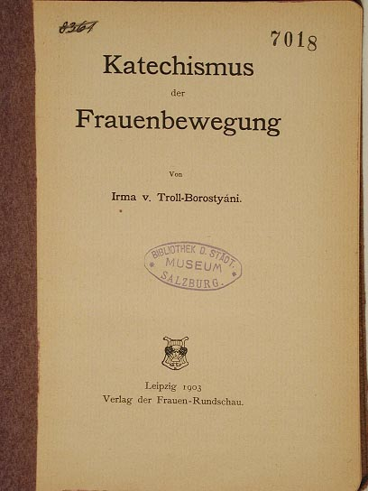 Irma von Troll-Borosty Buch "Katechismus der Frauenbewegung"(1903)